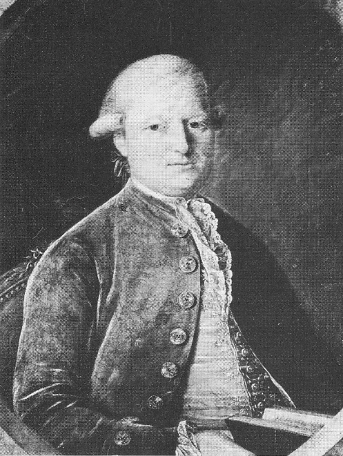 Adam Franz Xaver Philipp von Roggenbach (1750-1830); Neffe des Fürstbischofs Sigismund von Roggenbach; Oberhofmarschall an dessen Hof in Pruntrut